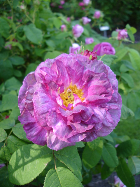 Rosa Gallica-group 'Ornament de la Nature'